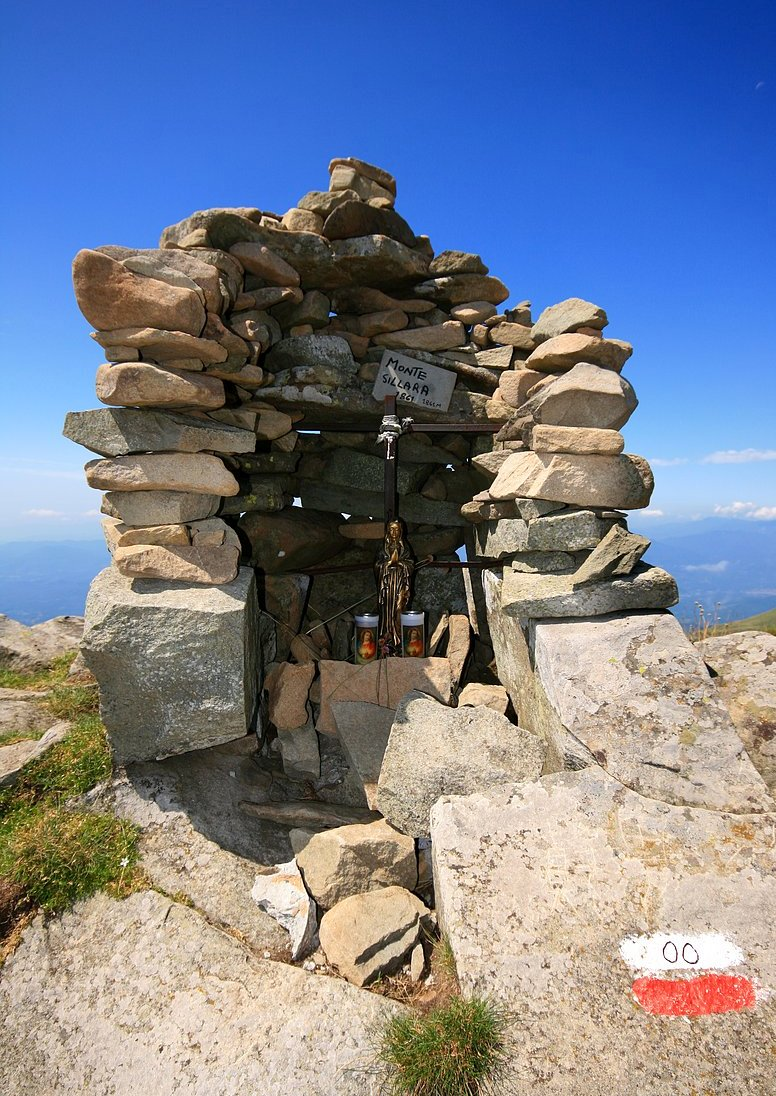 La Madonnina sulla vetta del monte Sillara (1861 m), sul confine tra le prov. di Parma e di Massa-Carrara.